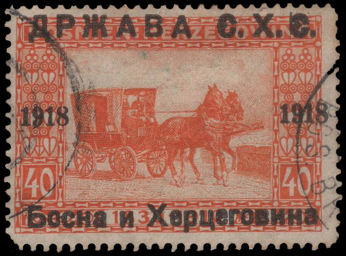 Почтовая марка Государства Словенцев, Хорватов и Сербов (Сараевская дирекция)